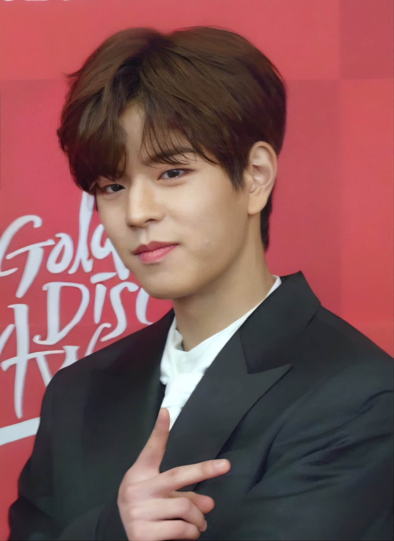 Stray Kids 昇玟於2019年1月6日在第33屆金唱片獎頒獎典禮